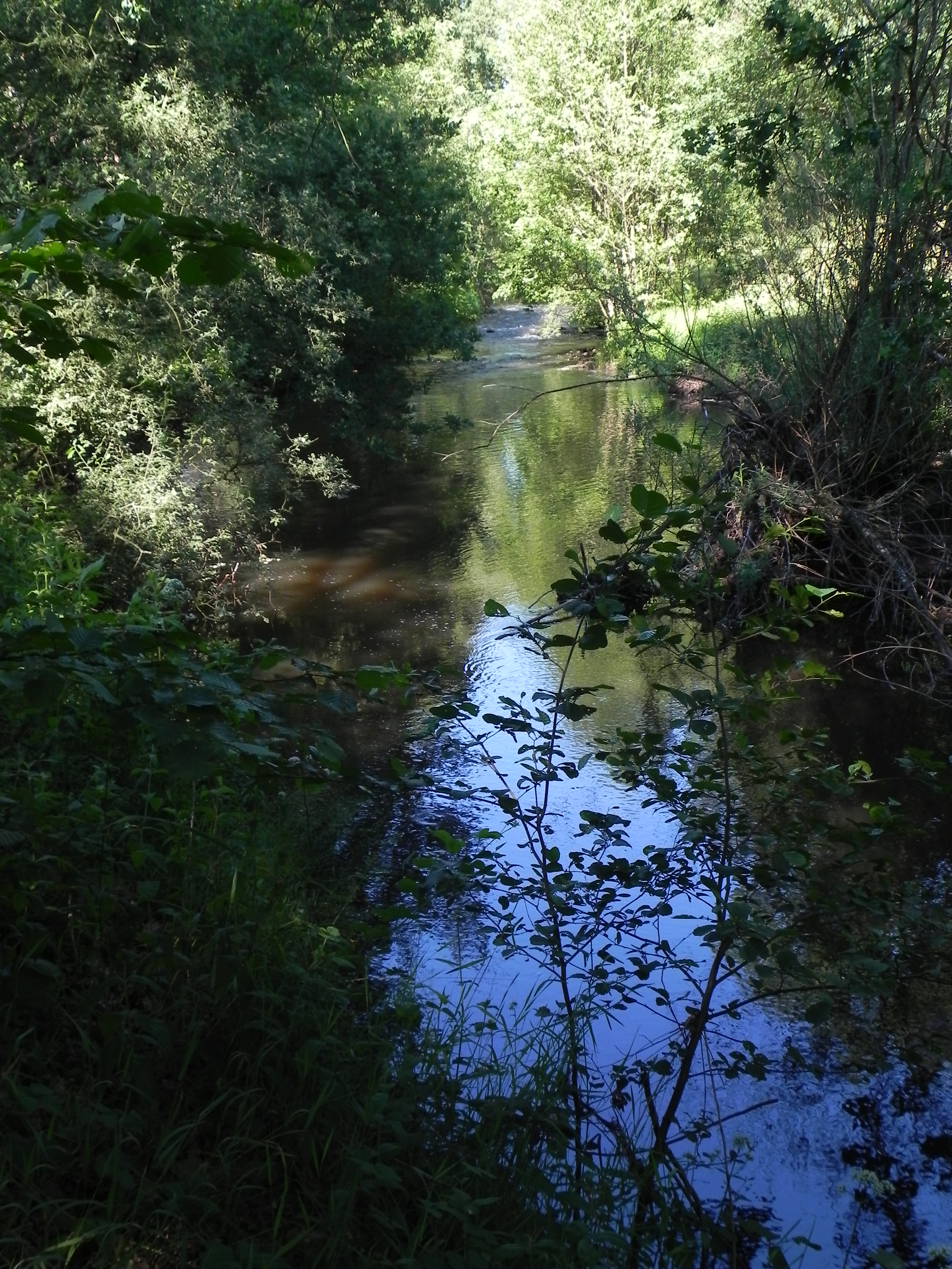 Örtzekanal südlich von Wolthausen, Landkreis Celle, Niedersachsen, Germany